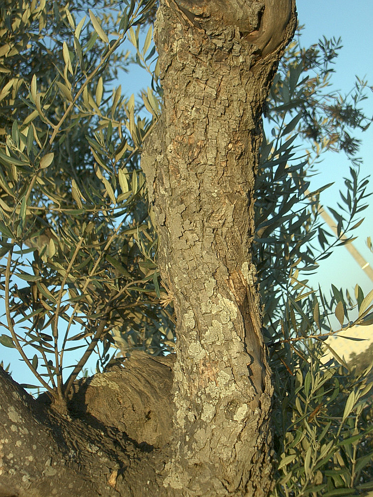 Tronc d'olivier à Bela Vista (Lisbonne, Portugal).